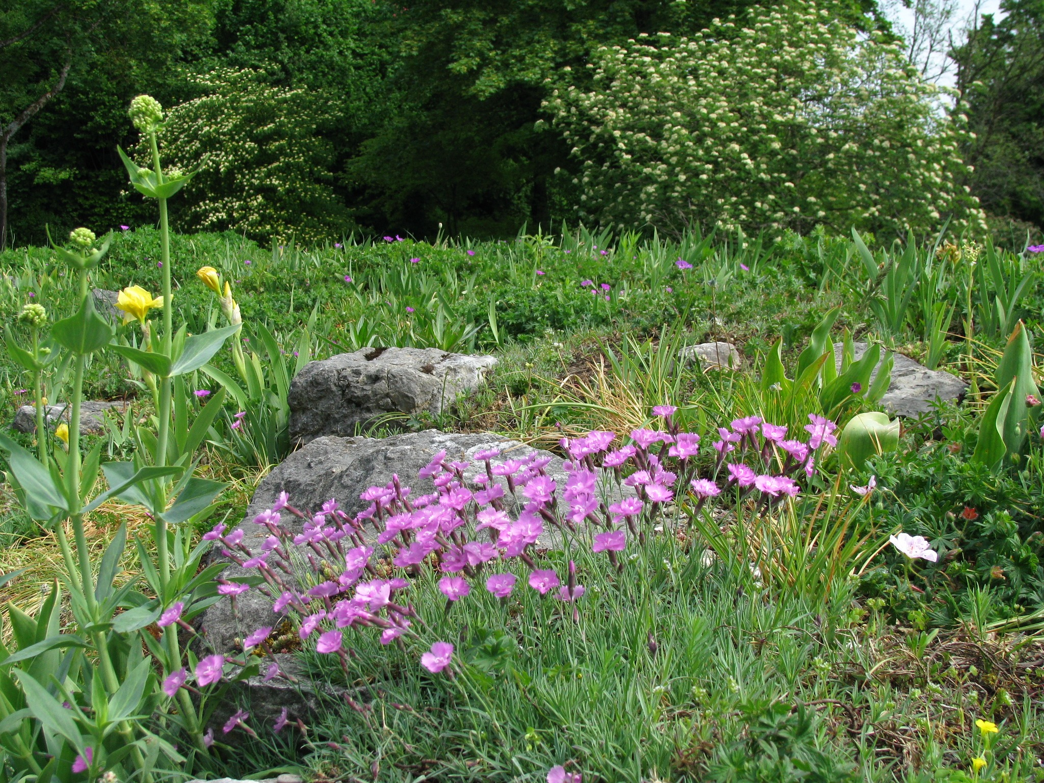 Westpark München, Alpinum im Westen des westlichen Teils, Mitte Mai